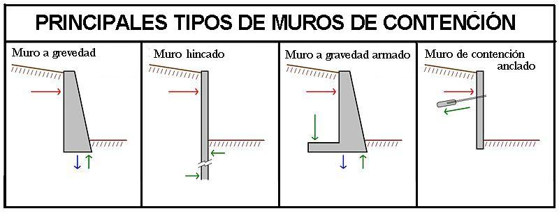 Principales tipos de muros de contención